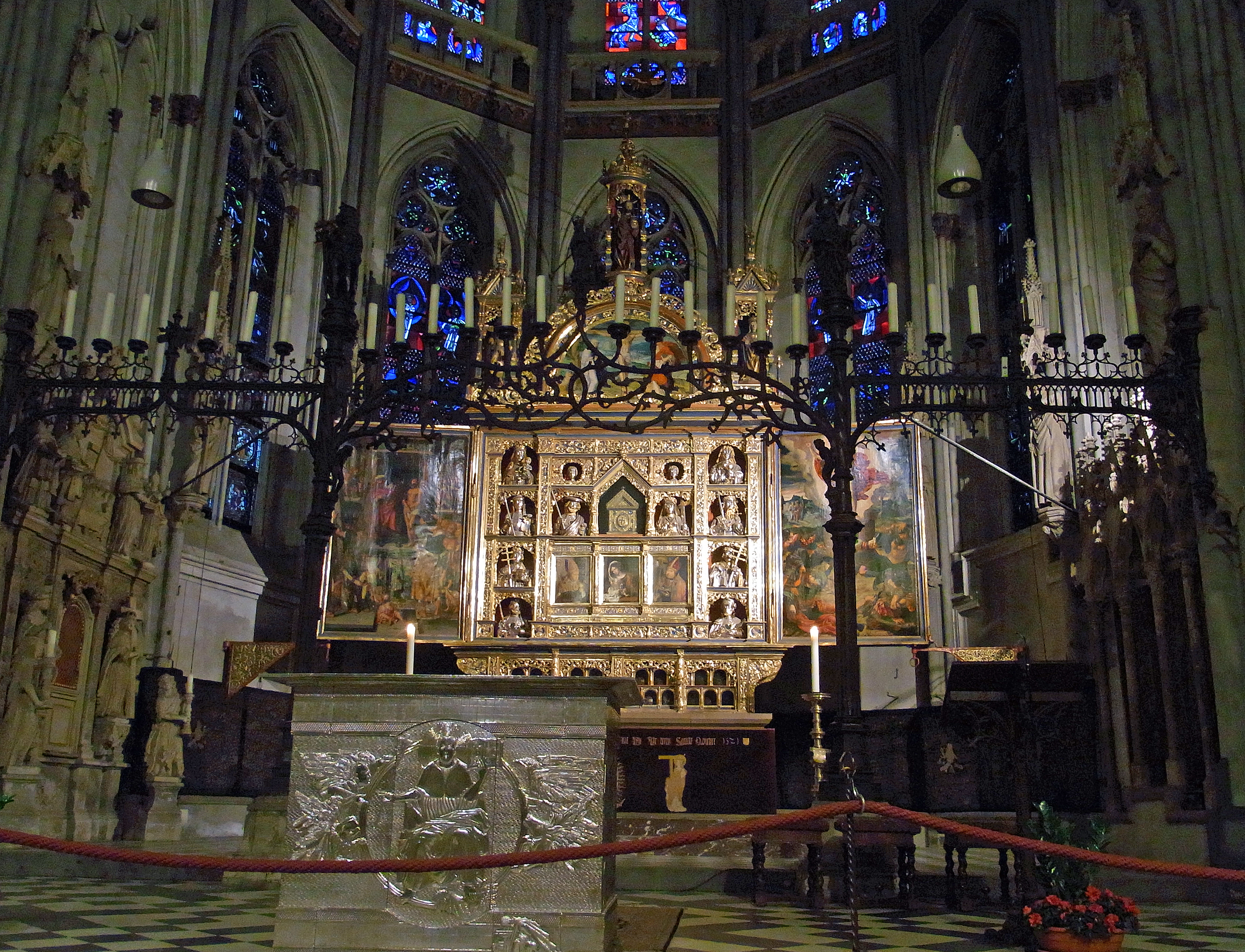 Xantener Dom: Hochaltar und Schmiedewerk Aert von Tricht This is a photograph of an architectural monument.